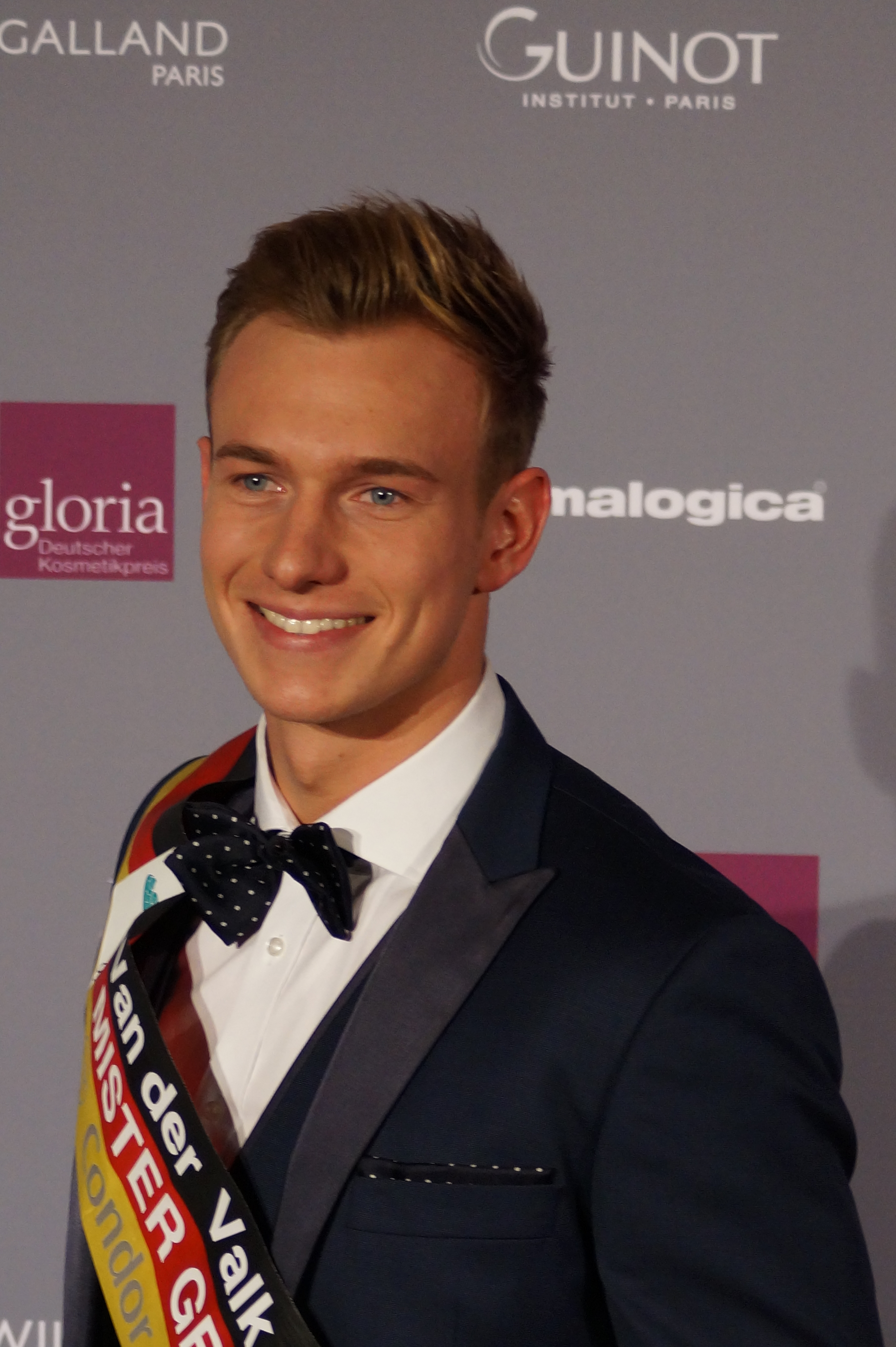 "Gloria – Deutscher Kosmetikpreis" am 27. März 2015 im Hilton Hotel Düsseldorf.